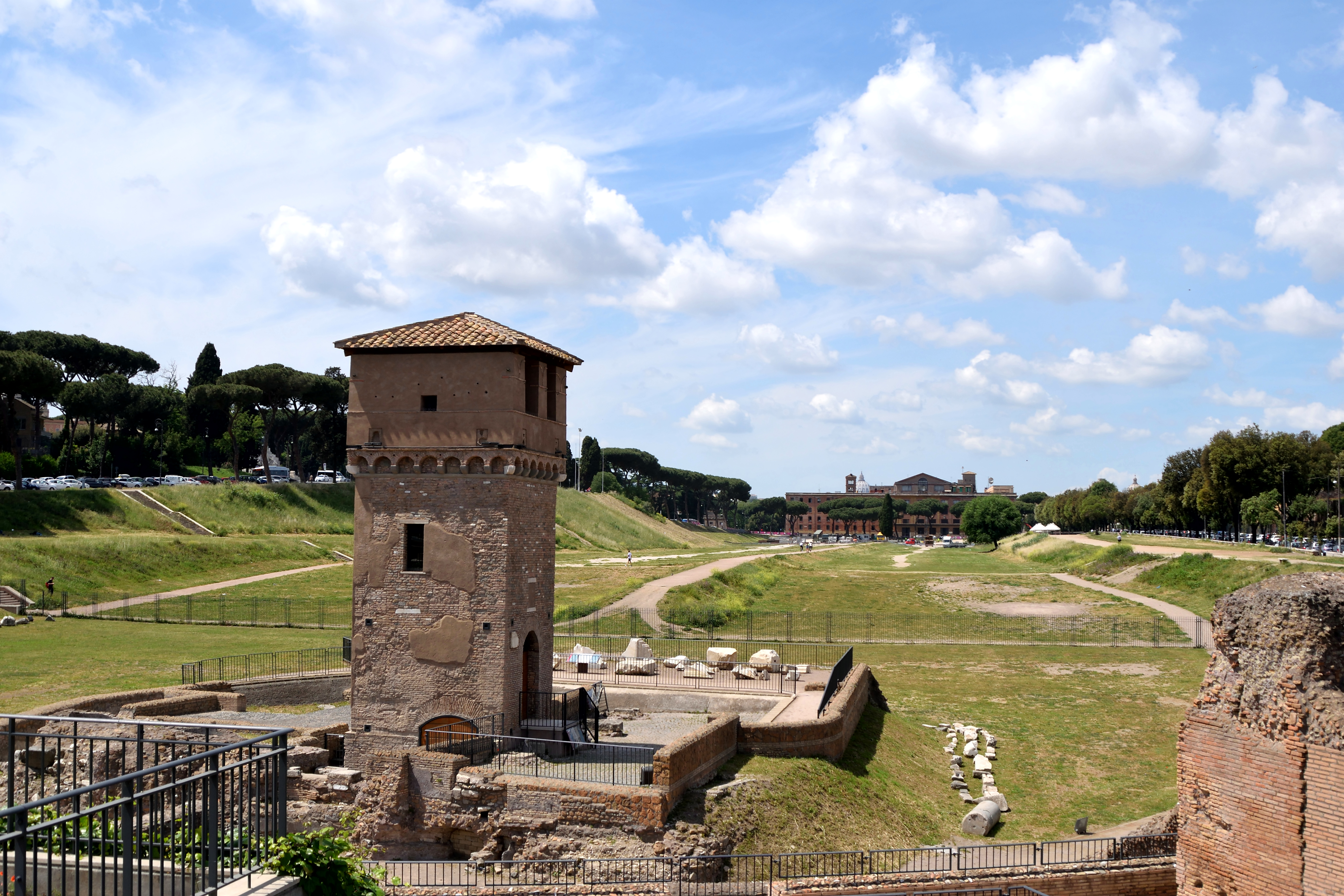 Das heutige Gelände des Circus Maximus an der Südostkurve